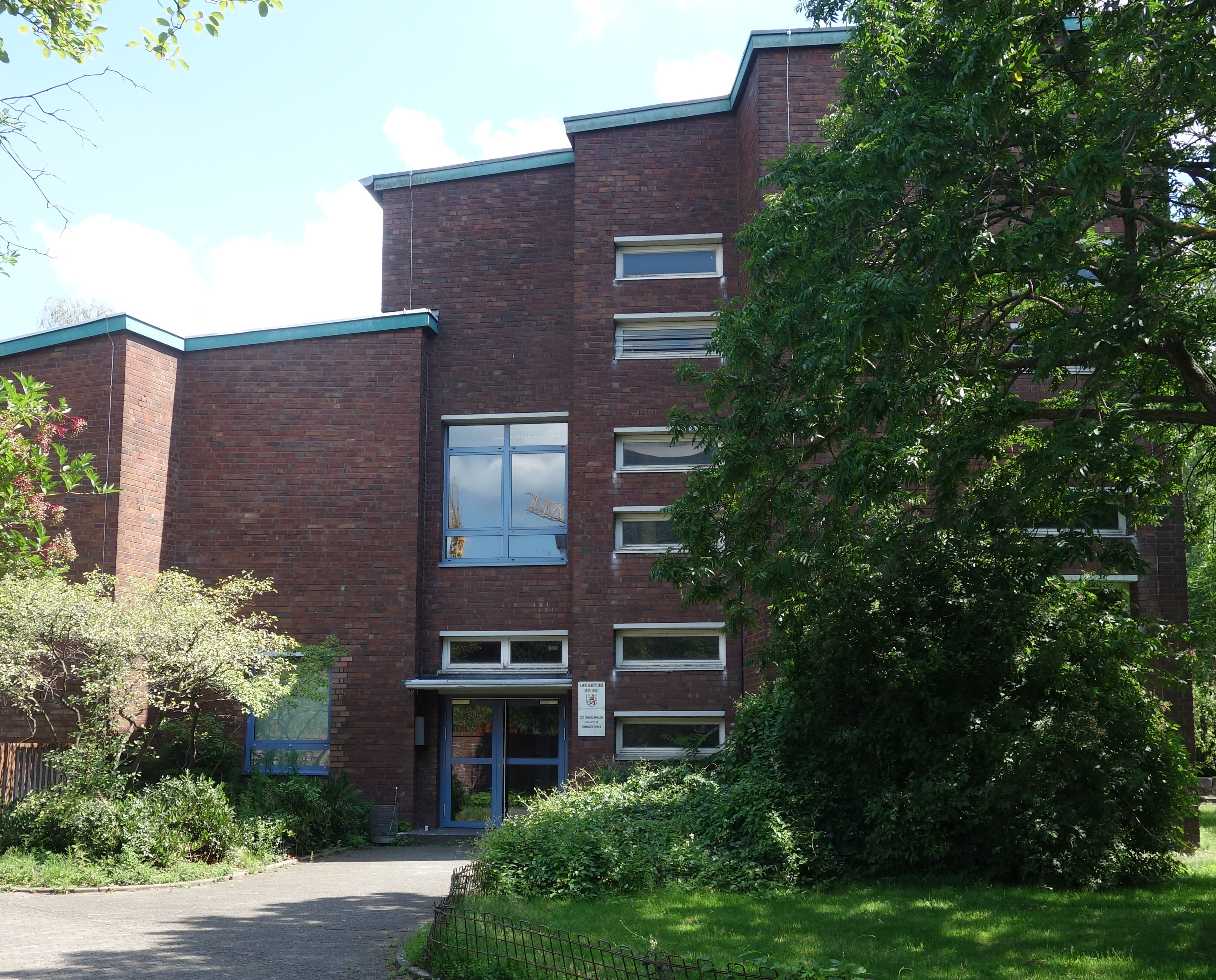 Comenius-Gymnasium in Düsseldorf-Oberkassel (heutiges Schulgebäude)